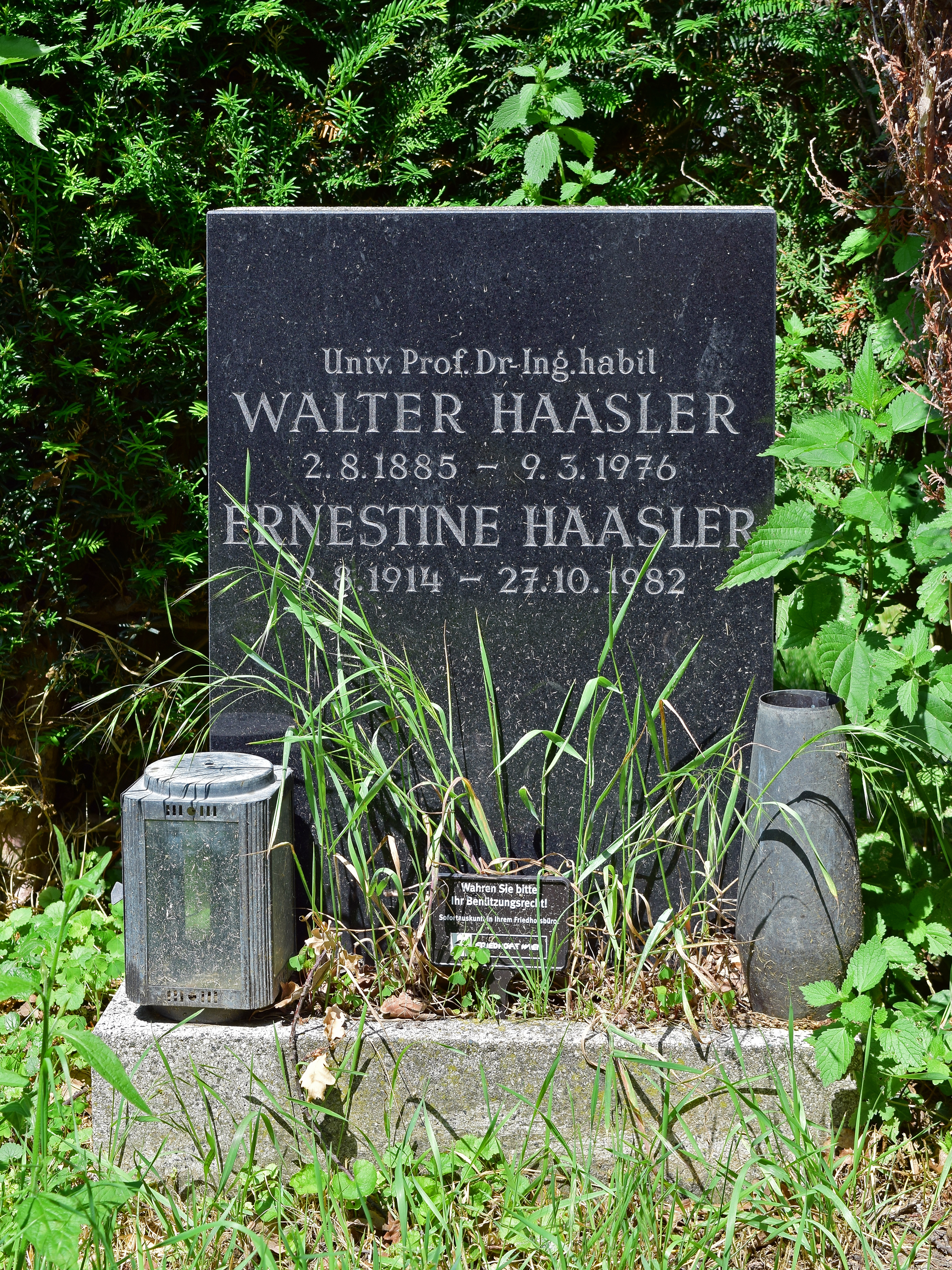 Grab von Walter Haasler auf dem Urnenhain der Feuerhalle Simmering, Abt. 1, Ring 3, Gruppe 2, Nr. 44